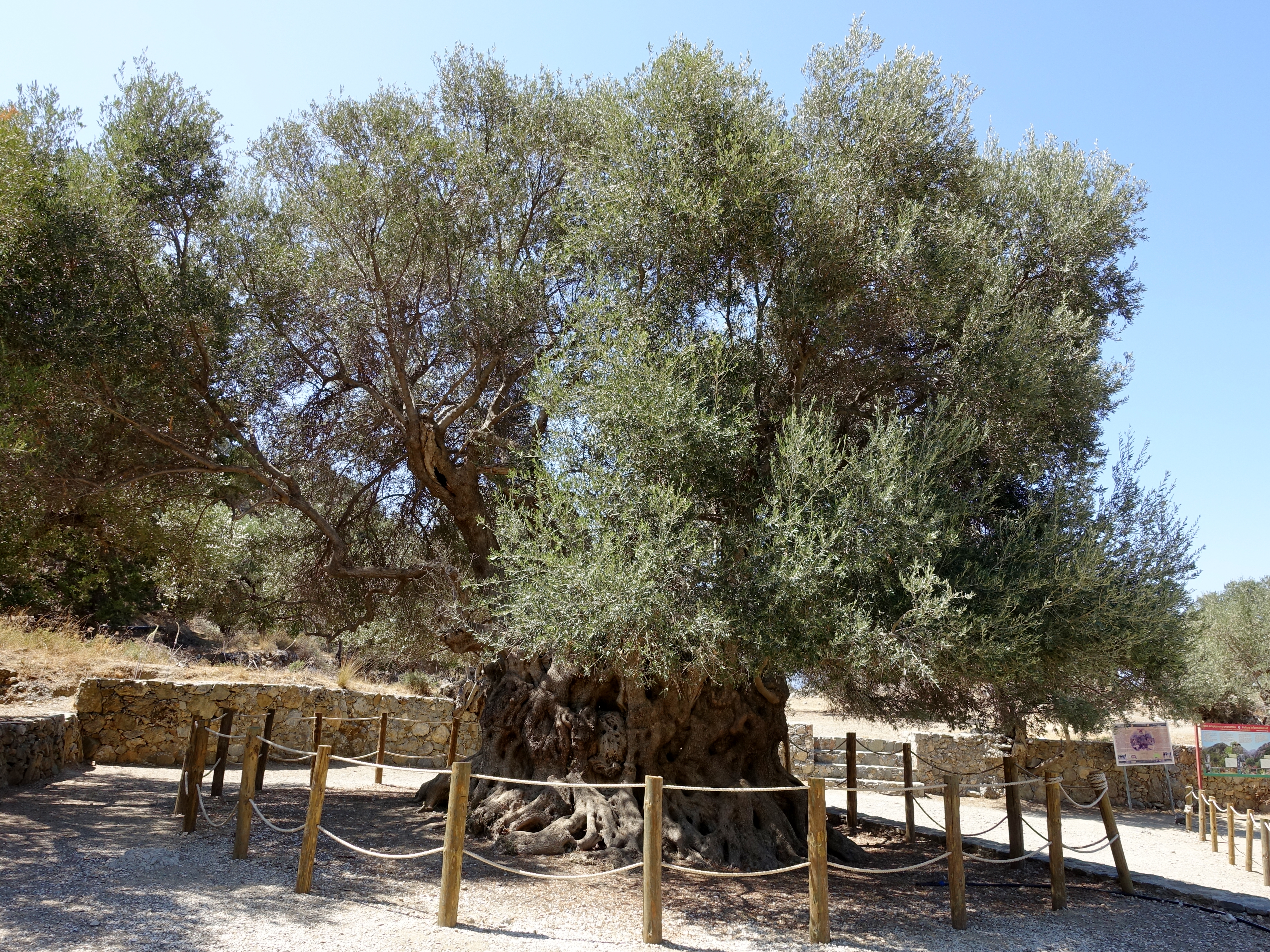 Olivenbaum (Olea europaea), ca. 3250 Jahre alt (Nachpalastzeit, 1350–1100 v. Chr.), Höhe 6,90 m, Kronenbreite 9,50 – 10,90 m, Stammbreite 4,20 – 4,90 m, nahe Kavousi, Kreta, Griechenland